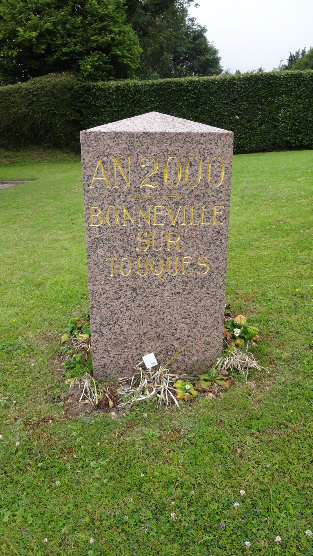 Borne célébrant l'an 2000 à Bonneville-sur-Touques (Calvados, France).